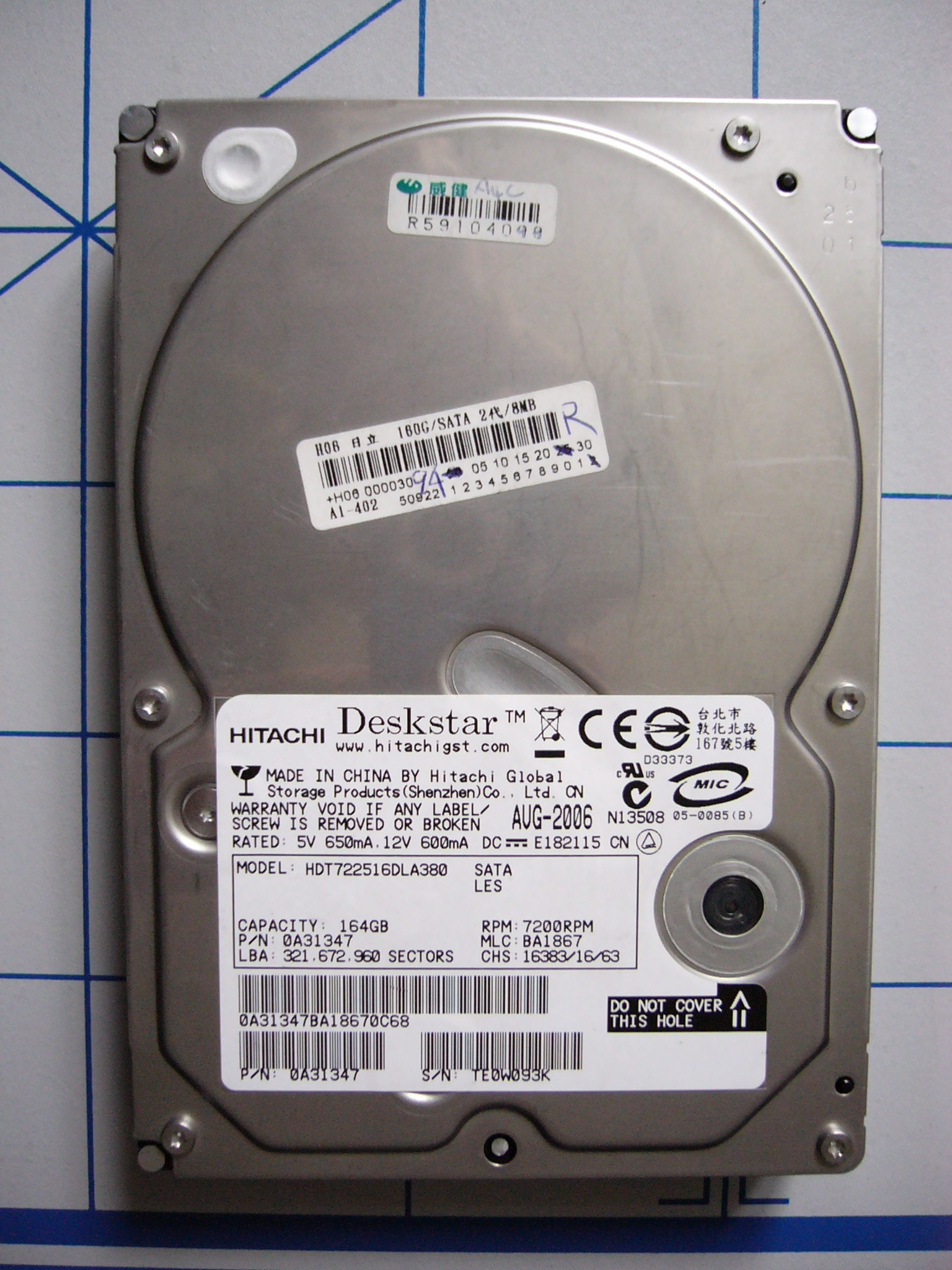 日立環球儲存科技於2006年8月製造的3.5吋160GB硬碟HDT722516DLA380